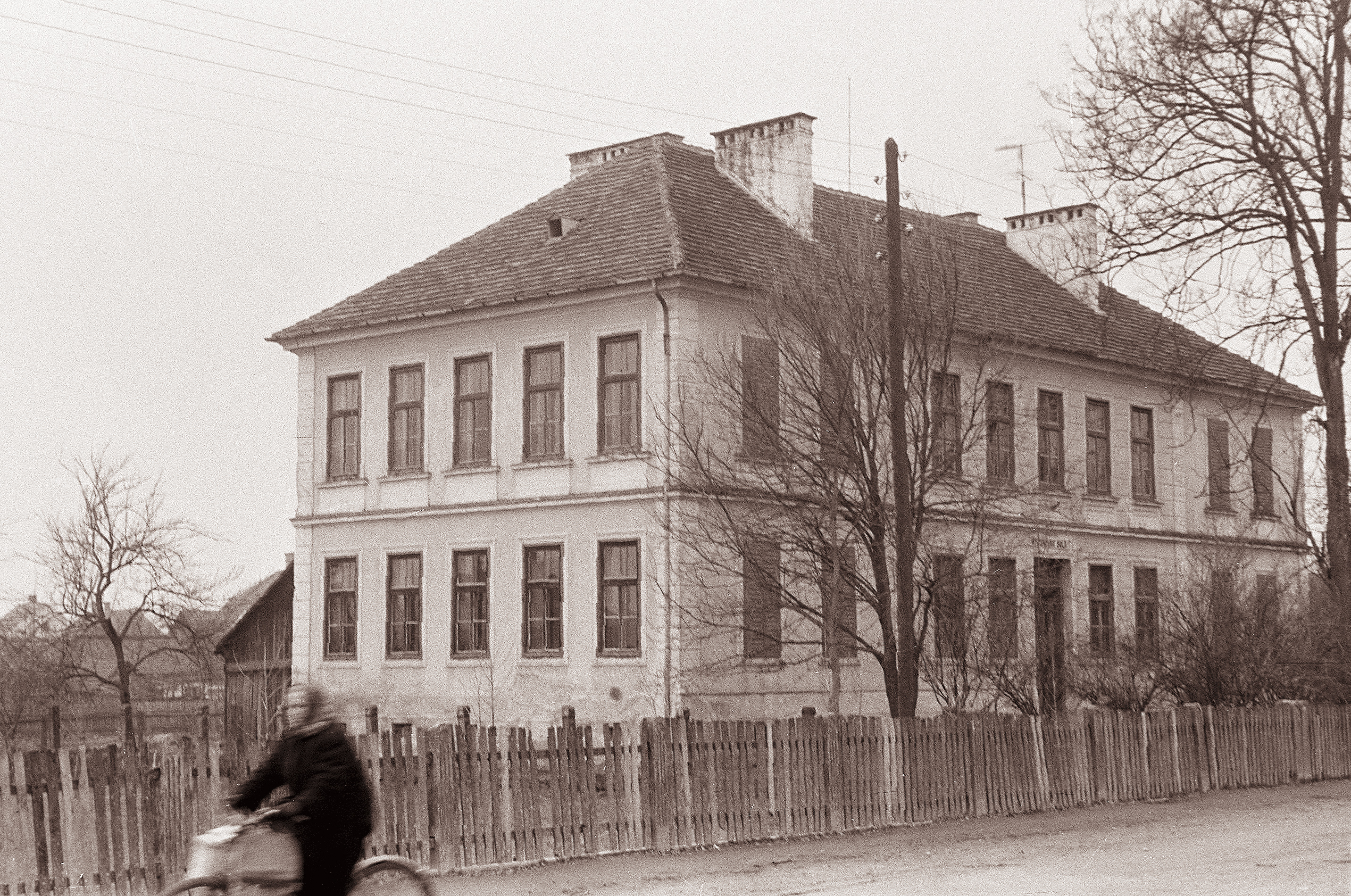 Poslopje središke šole